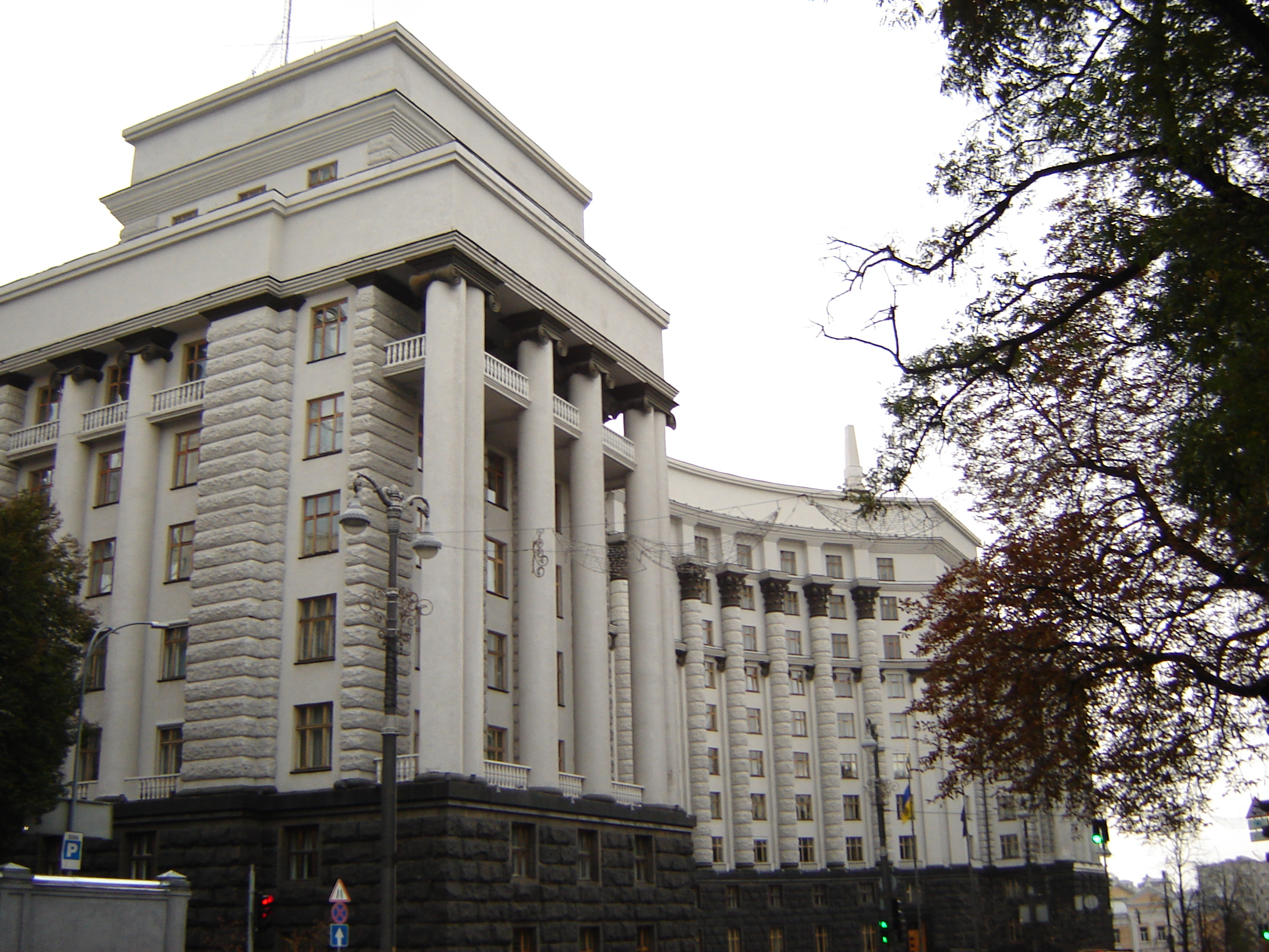 Будинок Ради народних комісарів УРСР (Будинок уряду України), Київ, Грушевського Михайла вул., 12/2